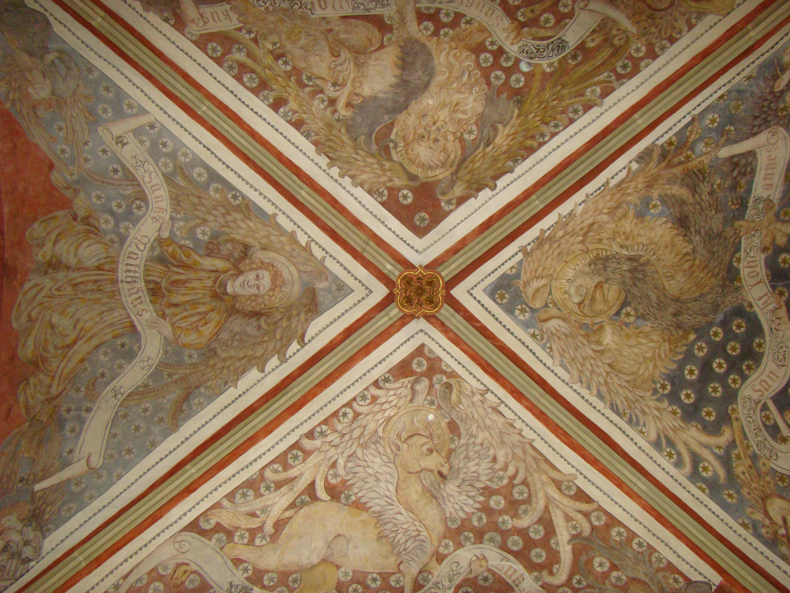 Evangelische Stadtkirche Möckmühl, Fresken im Chor, Evangelistensymbole in den Gewölbekappen